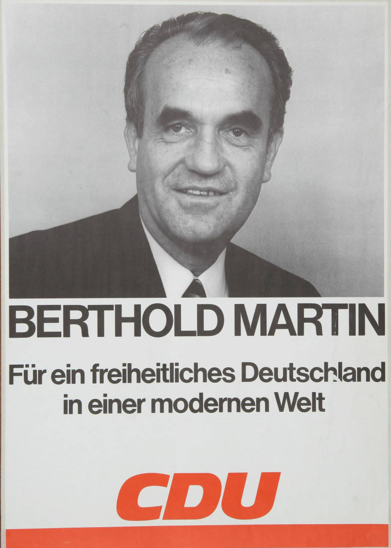 Für ein freiheitliches Deutschland in einer modernen Welt CDU Abbildung: Porträtfoto Plakatart: Kandidaten-/Personenplakat mit Porträt Objekt-Signatur: 10-001: 1692 Bestand: Plakate zu Bundestagswahlen (10-001) GliederungBestand10-18: Plakate zu Bundestagswahlen (10-001) » Die 7. Bundestagswahl am 19. November 1972 » CDU » Mit Porträtfoto Lizenz: KAS/ACDP 10-001: 1692 CC-BY-SA 3.0 DE